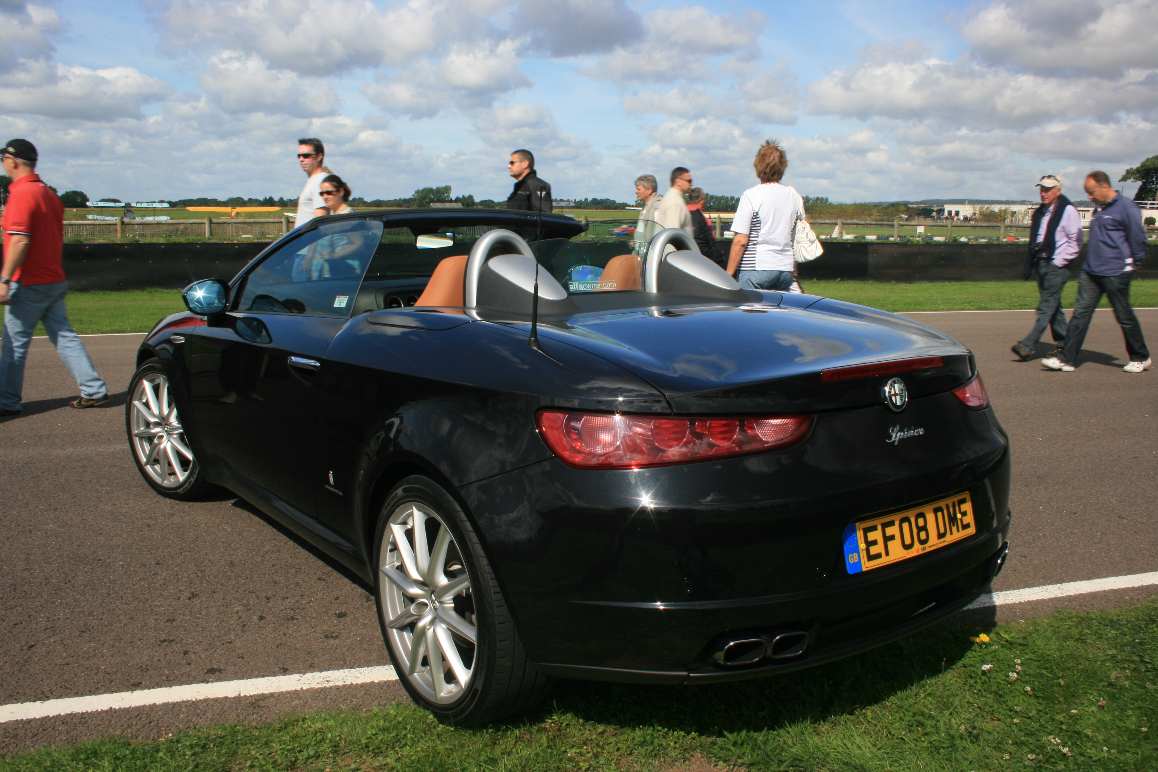 Alfa Romeo Spider